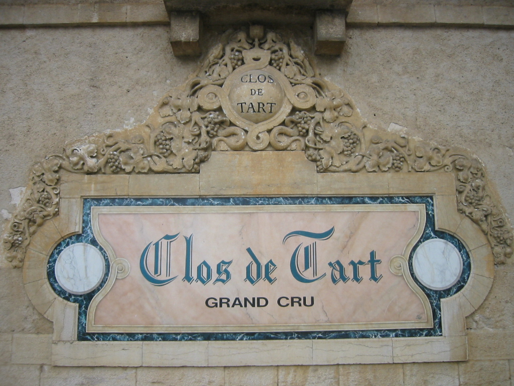 Ecusson Clos de Tart Grand Cru de Morey Saint Denis en Bourgogne